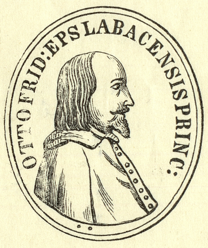 Otto Friedrich von Buchheim (Puchheim) (1604-1664), Bischof von Ljubljana 1641-1664 Slovene bishop.